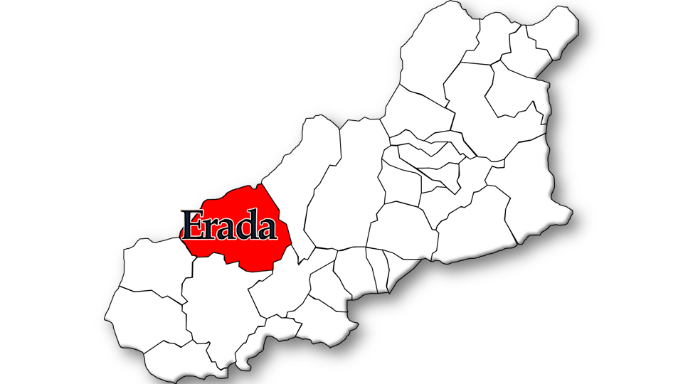 População